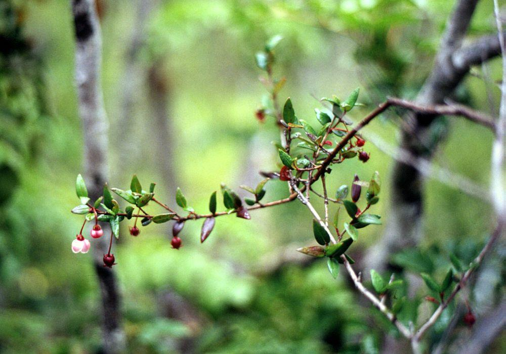 Ugni molinae, Myrtaceae - Chile, Salto de Petrohué (Prov. de Llanquihue)